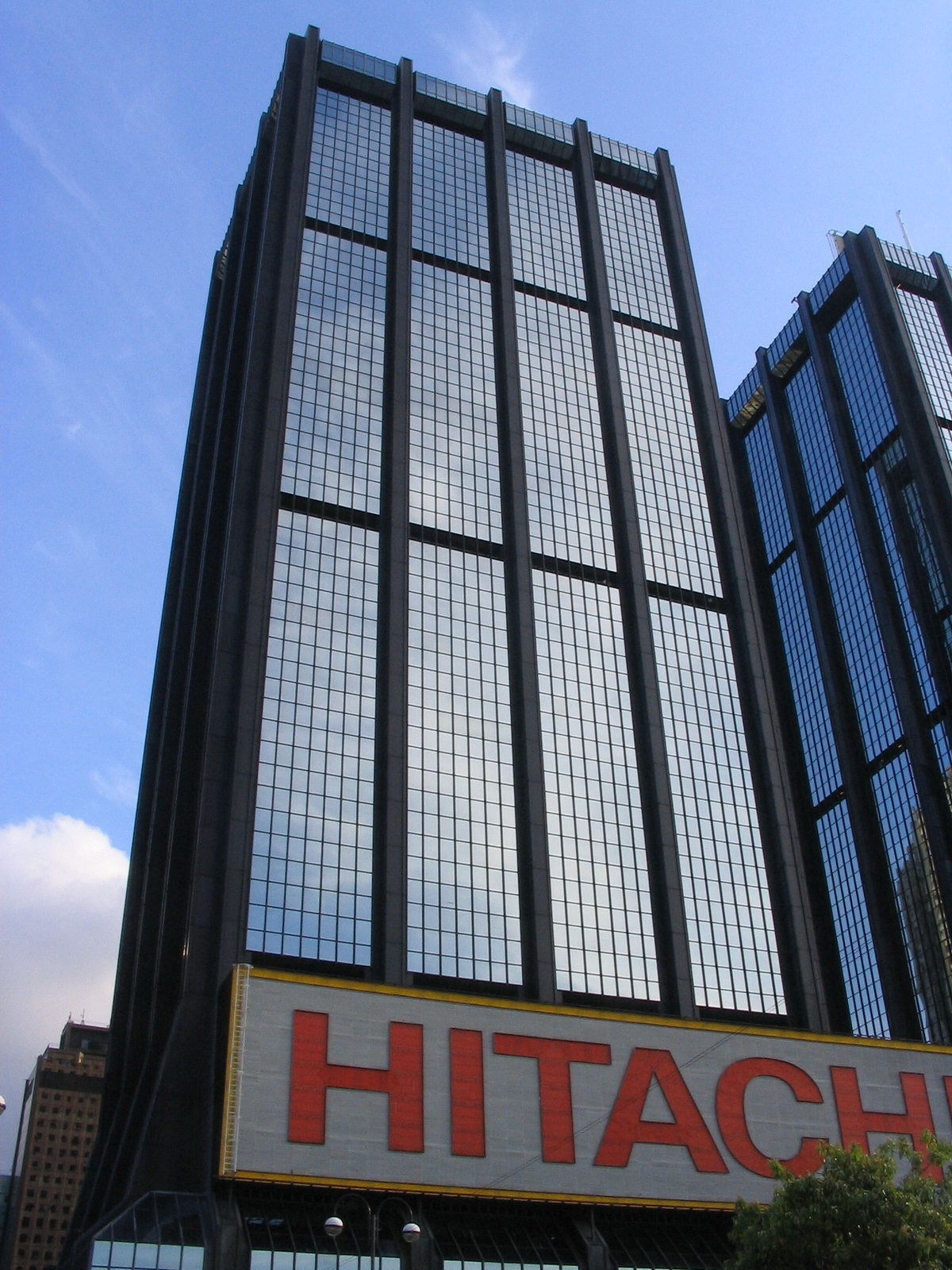 海港中心 Harbour Centre